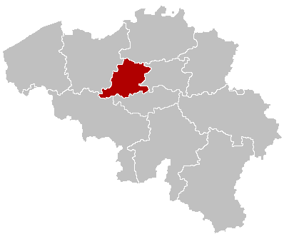 Locatie kiesdistrict BHV